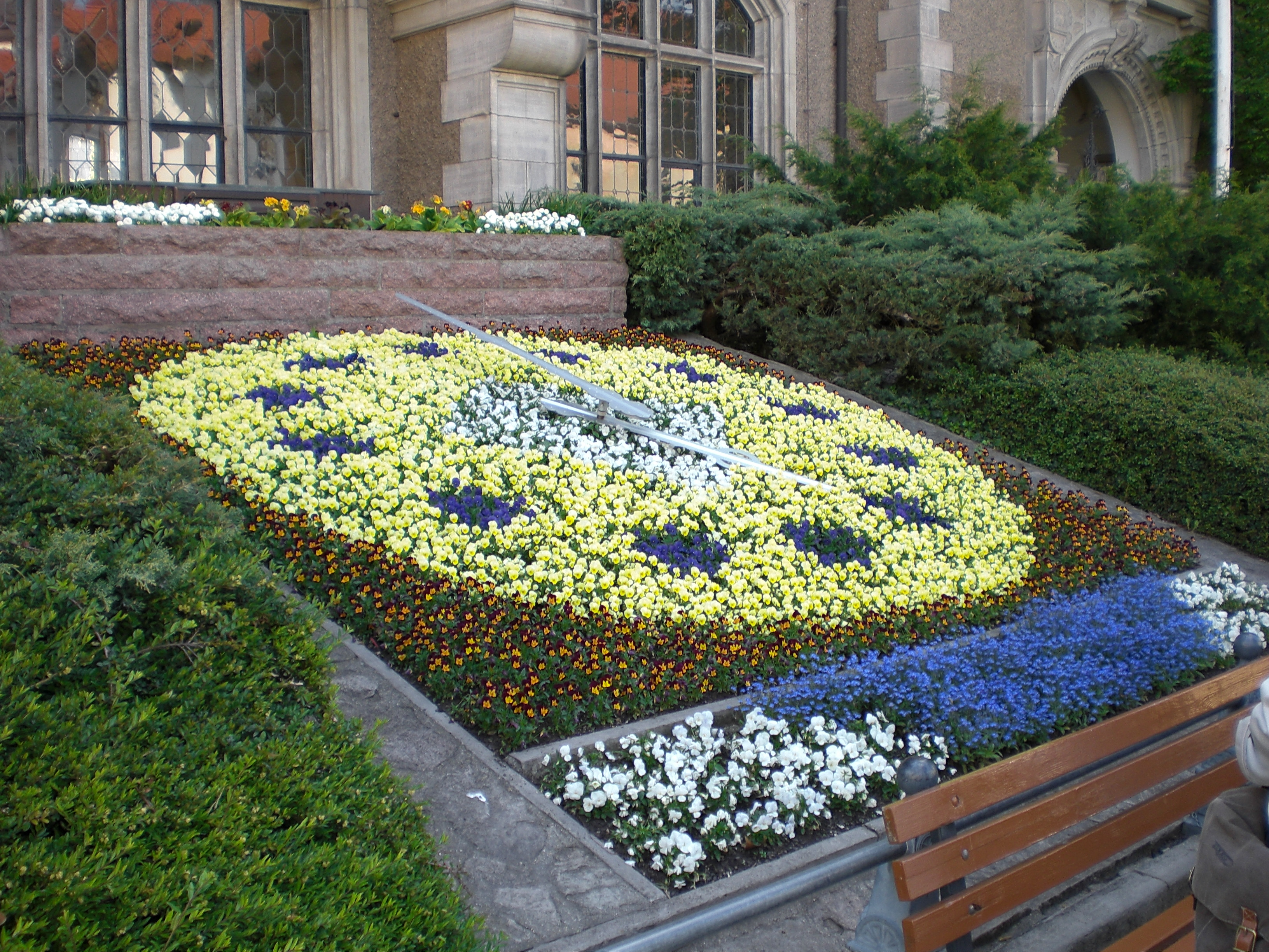 Bernburger Blumenuhr